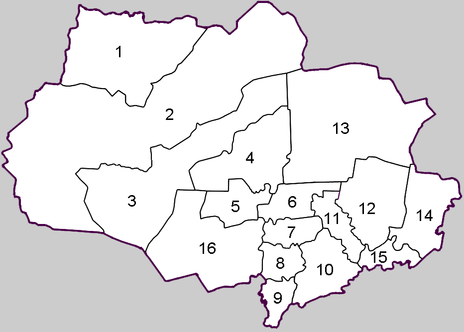 Районы Томской области